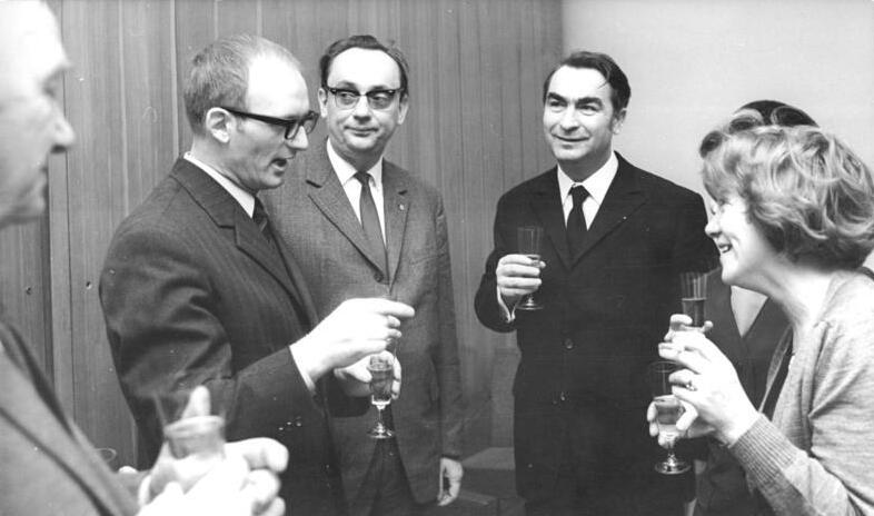 Zentralbild Franke 12.2.70 Berlin: Schriftstellerverbände unterzeichneten Vertrag Der 1. Sekretär des Deutschen Schriftstellerverbandes Gerhard Henniger (3.v.l.) und der Präsident des Jugoslawischen Schriftstellerverbandes, Aco Sopov (4.v.l.) unterzeichneten am 12.2.70 in Berlin einen Vertrag über die Zusammenarbeit beider Verbände im Jahre 1970. Dabei waren der Vizepräsident des DSV Hermann Kant (2.v.l.) und die Vizepräsidenten des Serbischen Verbandes Jara Ribnika (r.) zugegen - hier bei einem Gespräch nach der Unterzeichnung.